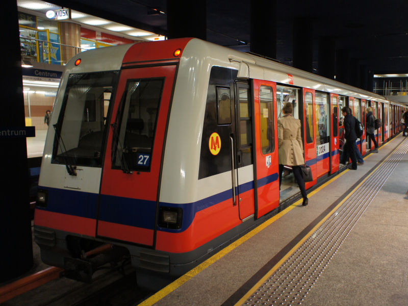 Alstom Metropolis 98B (pociąg nr 27) stoi na stacji A13 Centrum.